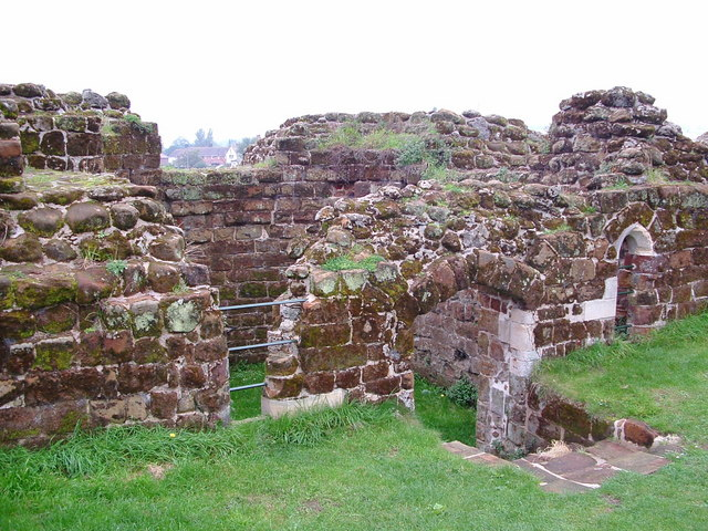 Bolingbroke Castle